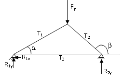 Exemple d'aplicació d'un sistema d'equacions per a resoldre un problema d'estàtica.